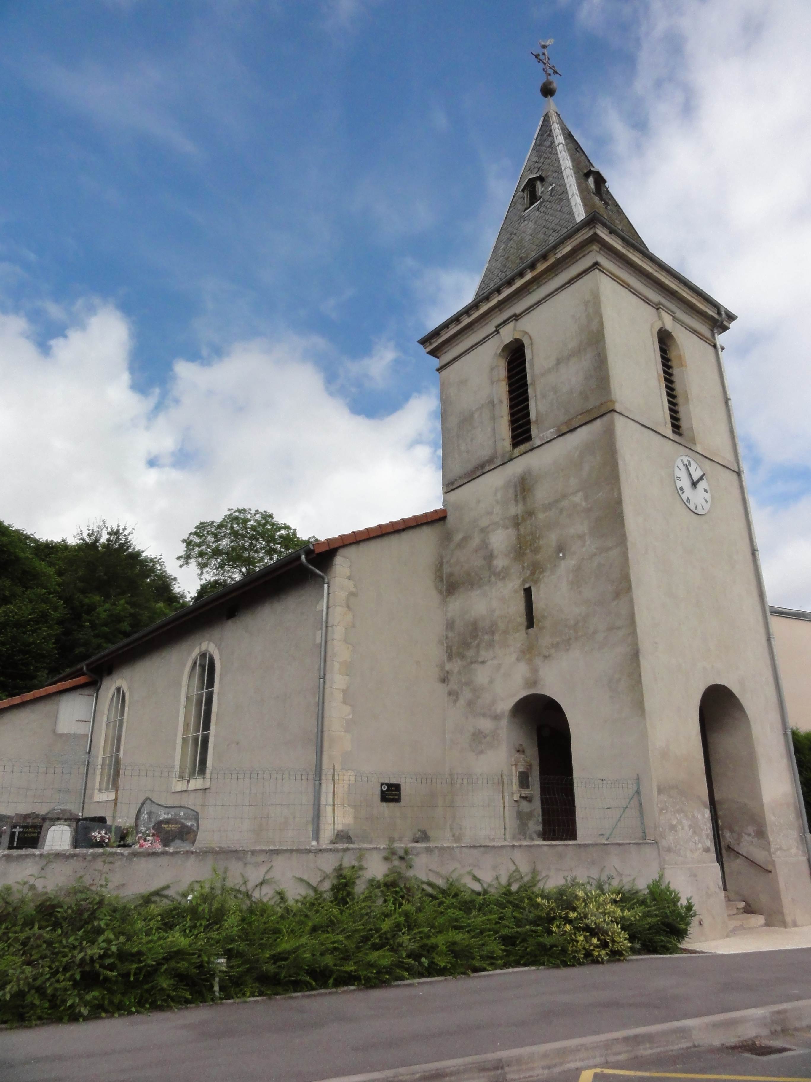 Crévéchamps (M-et-M) église